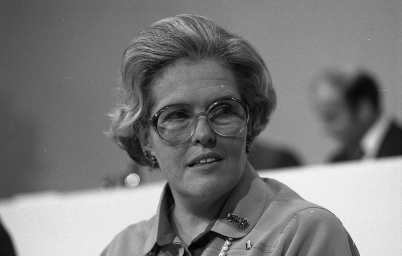 26. Bundesparteitag der CDU in der Friedrich-Ebert-Halle in Ludwigshafen